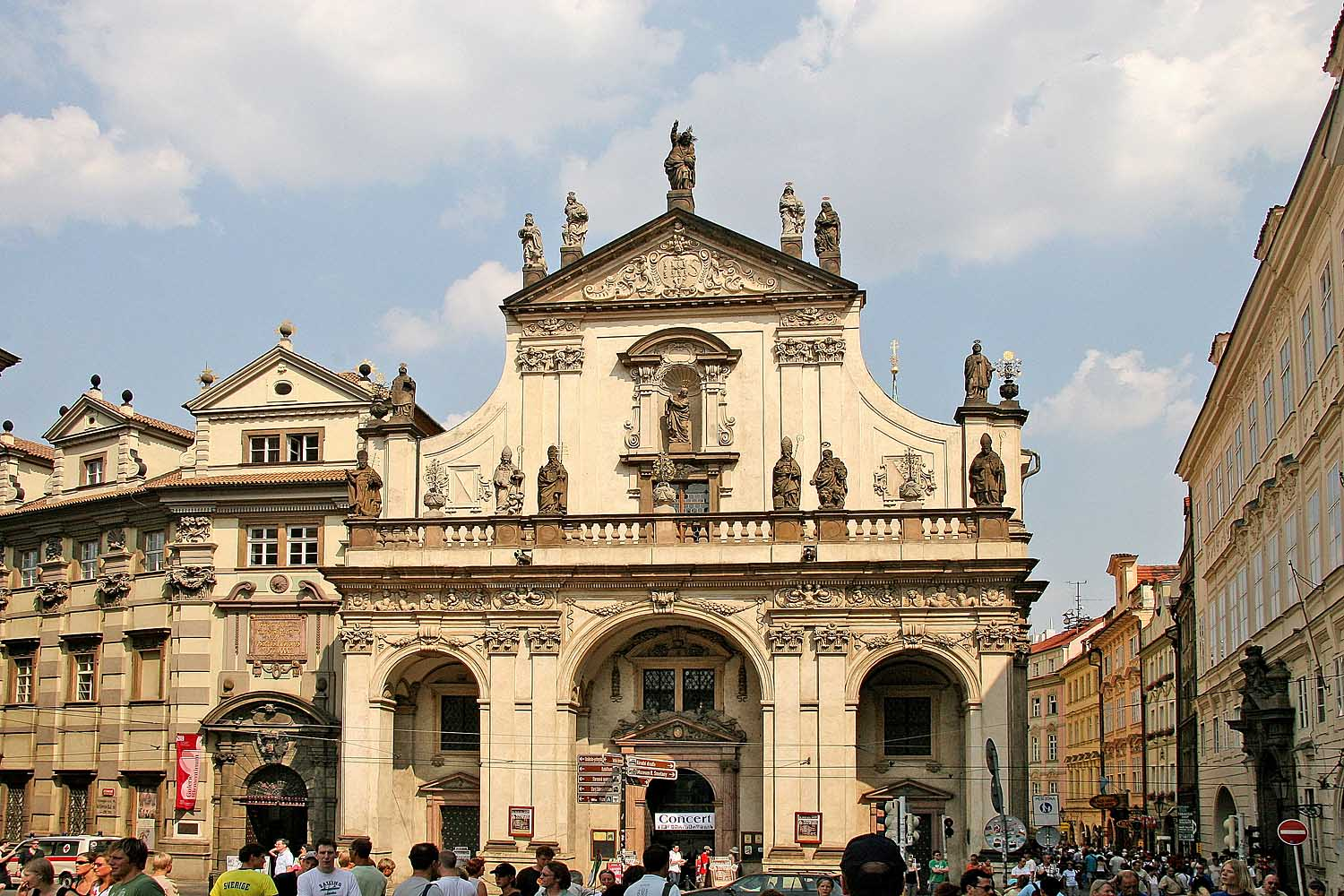 Kostel Svatého Salvátora na Křižovnickém náměstí v Praze